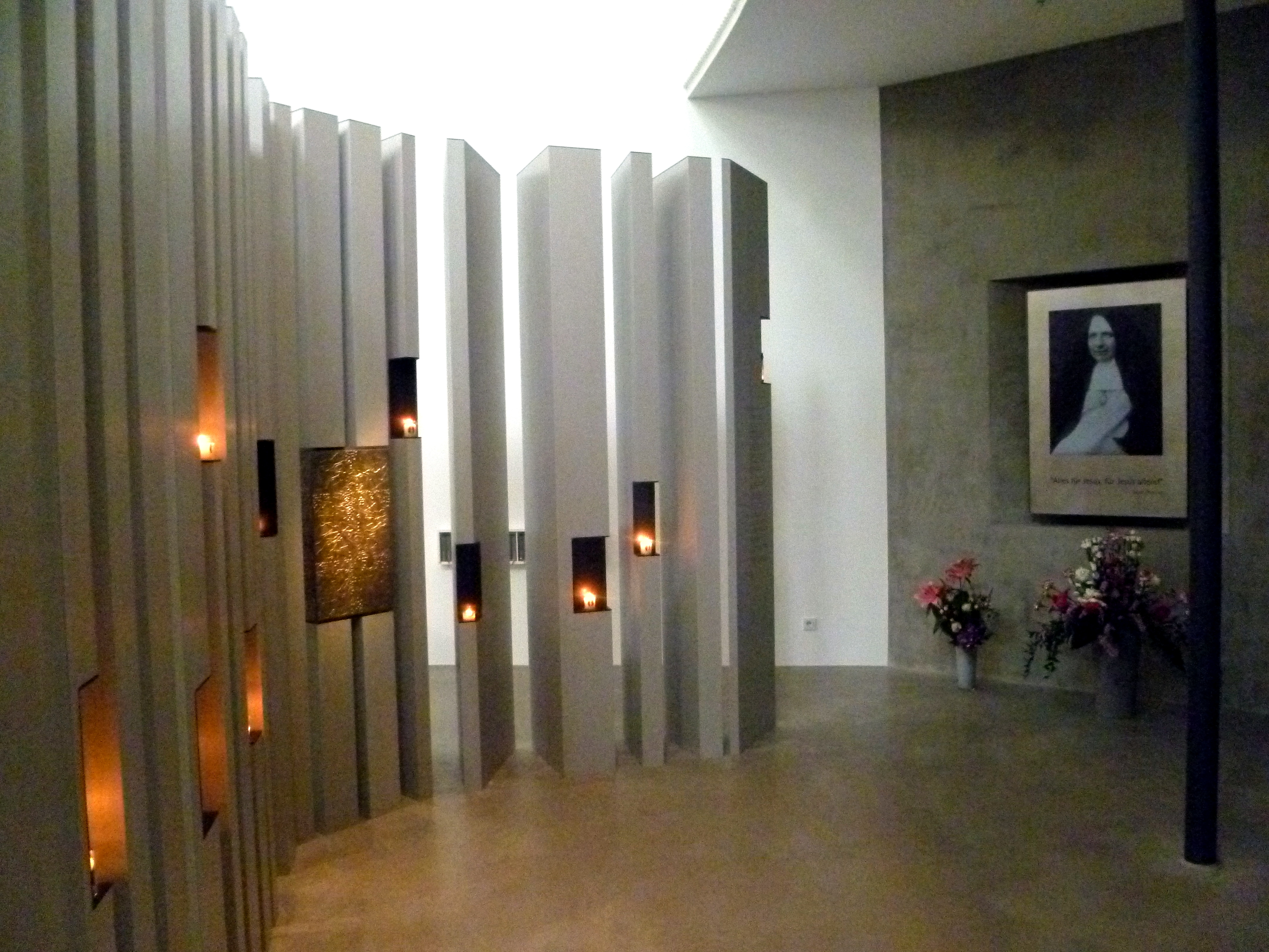 Reliquienstätte der Clara Fery in der Kind-Jesu-Kapelle im ehemaligen Mutterhaus der Kongregation in der Aachener Jakobstraße